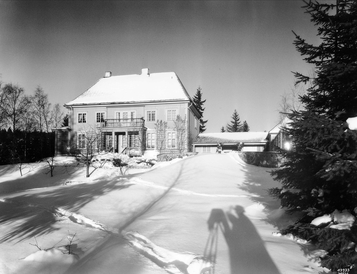 Gråkamveien 1 ca. 1935